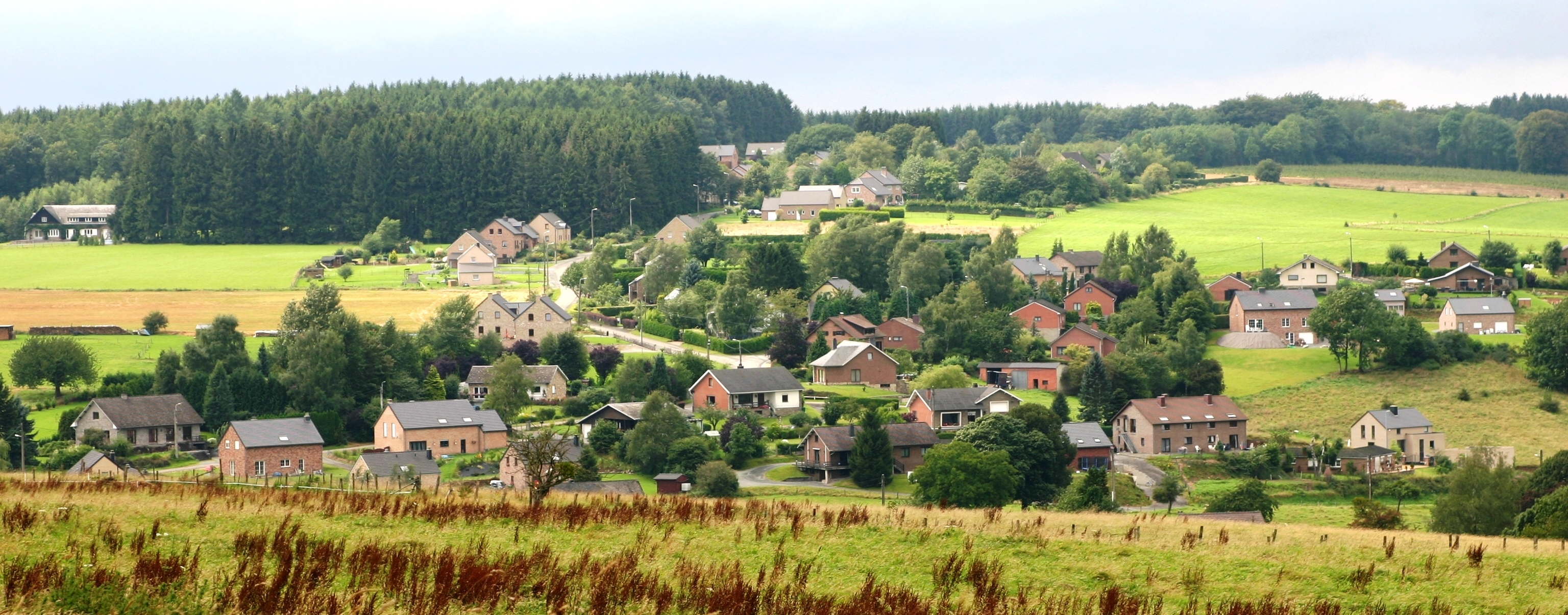 Houssonloge an der Provënz Léck.